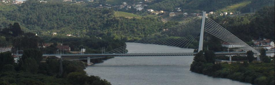 Ponte Nova, Coimbra